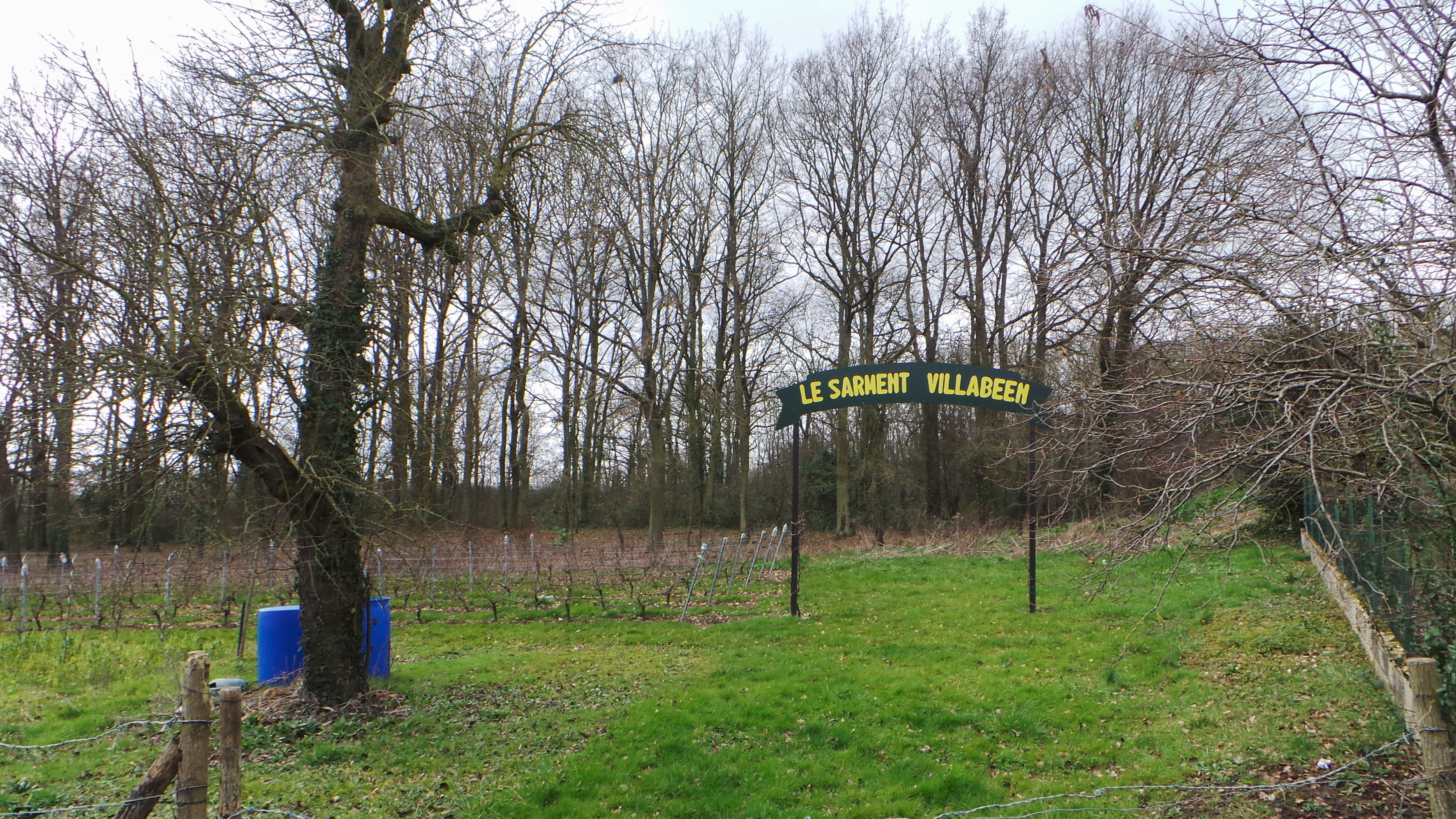 Vignes de Villabé / Le Sarment villabéen / Villabé / Essonne / France